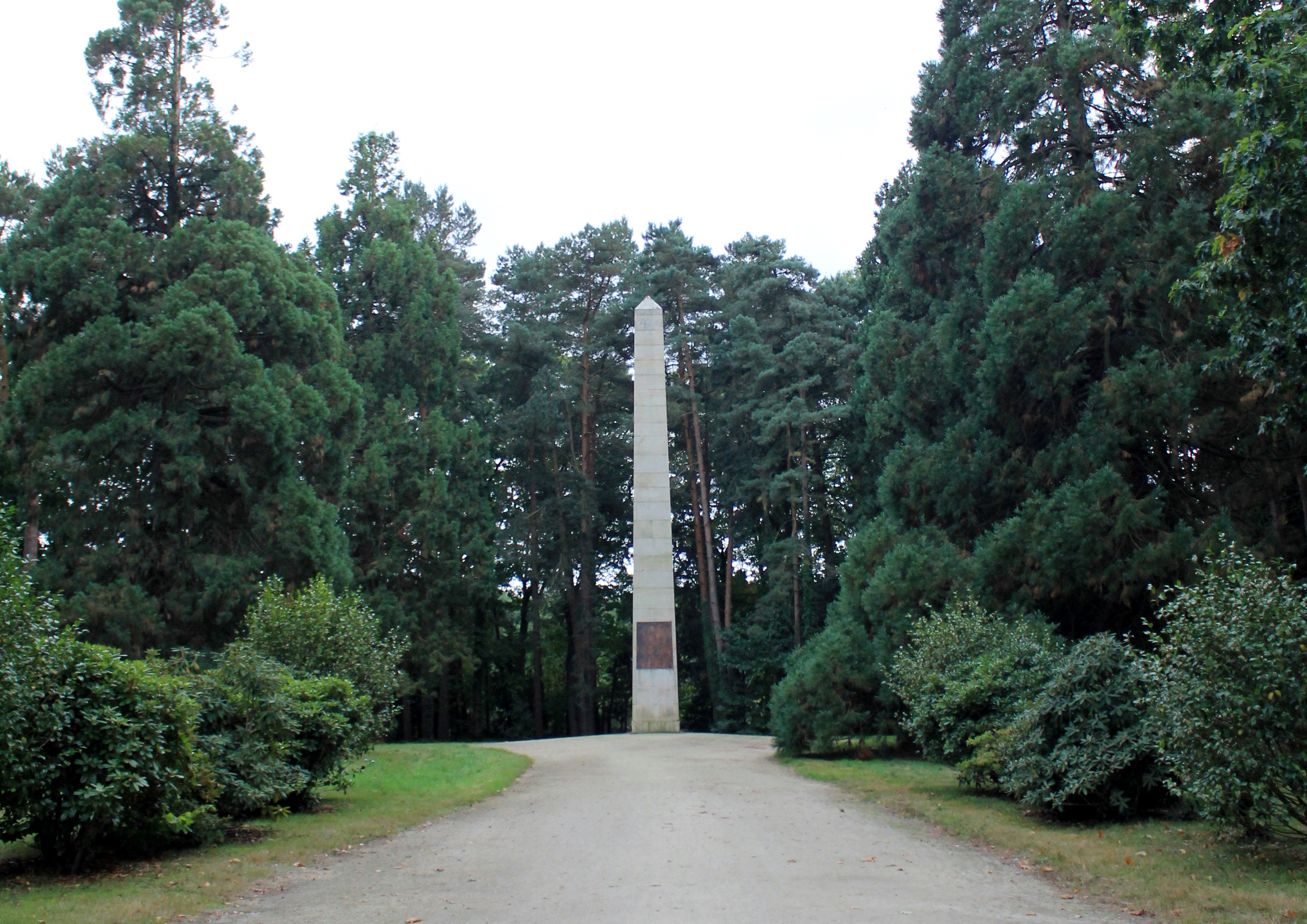 Colonne des Trente